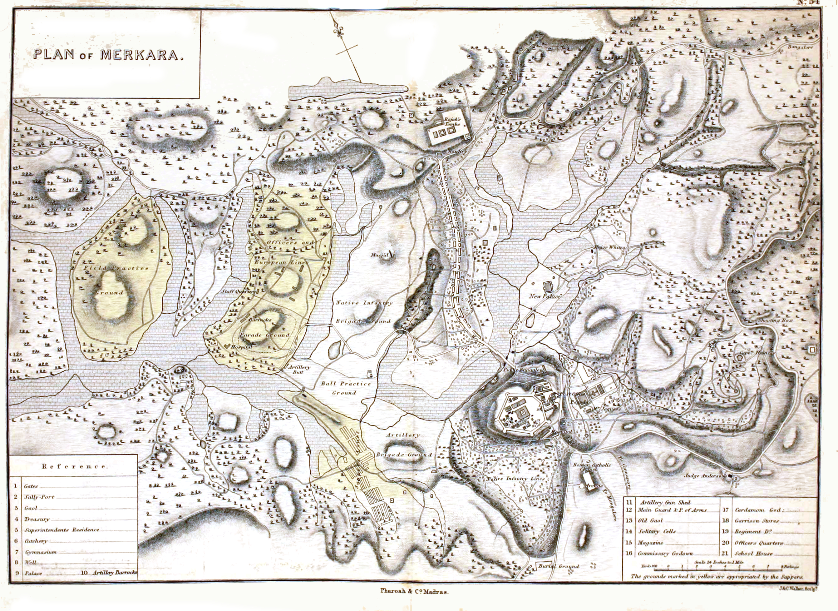 Plan of Madikeri in 1854